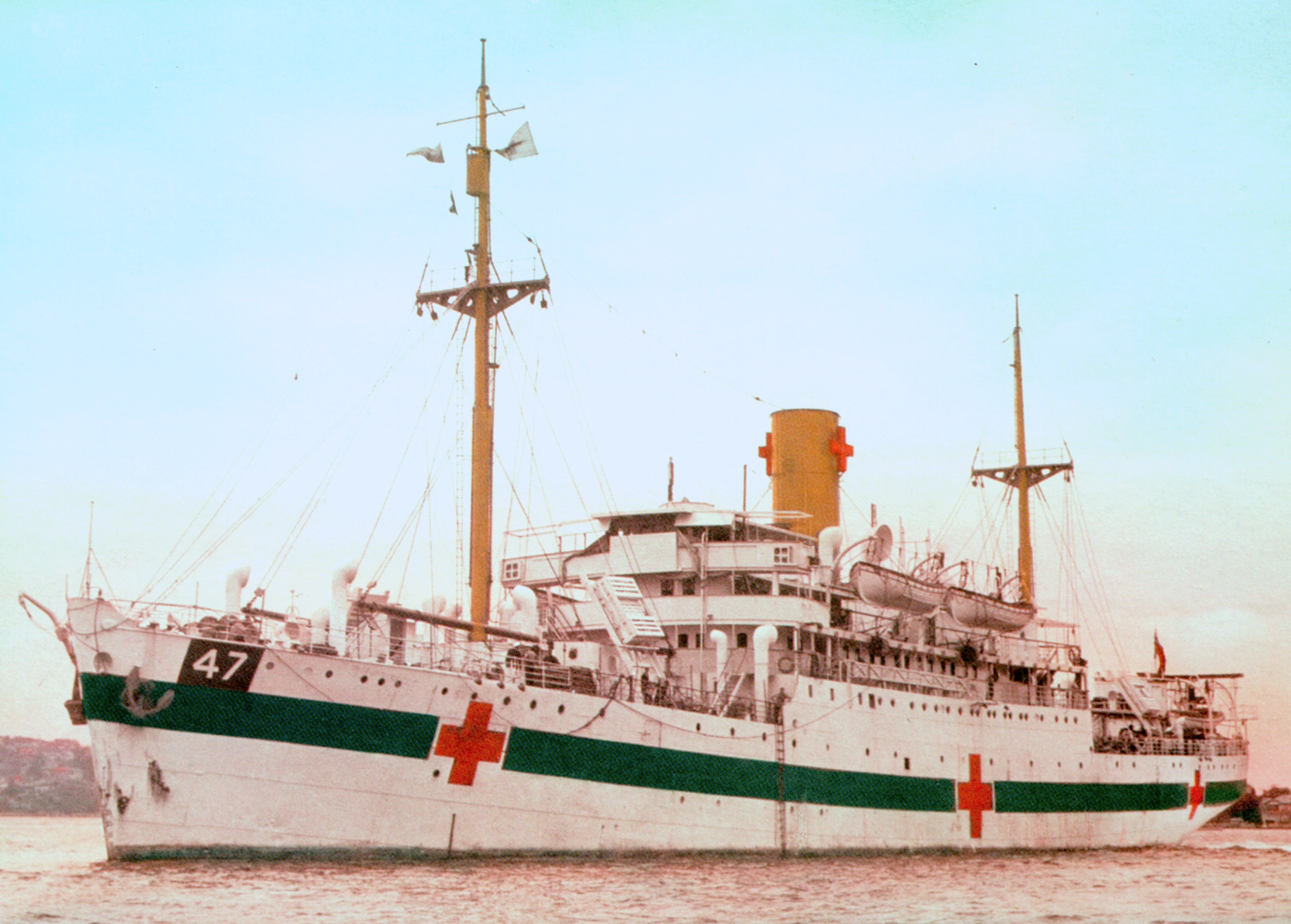 AHS Centaur. A rare colour photo.